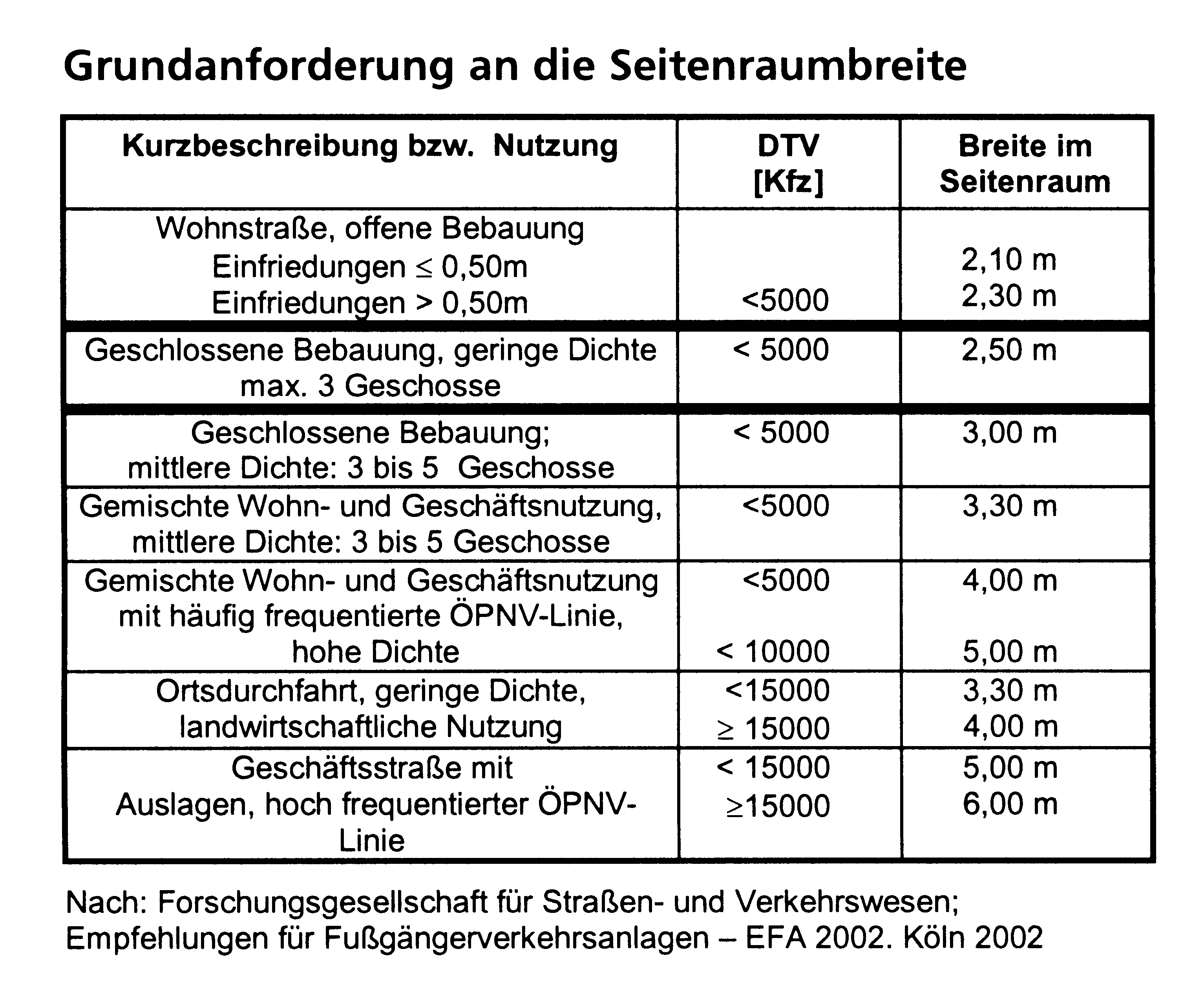 Seitenraumbreiten bei verschiedenen Straßentypen